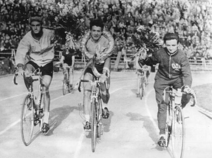 L. Zanoni, J. Melichow, B. Eckstein Zentralbild CTK 15.5.1961 Telefoto XIV. Internationale Friedensfahrt Warschau-Berlin-Prag 1961. 12 .Etappe von Tabor nach Brno am 15.5.1961. Ehrenrunde für die drei besten Fahrer der 12. Etappe. vlnr: Ludovic Zanoni, (Rumänien)- 3. PLatz-; Juri Melichow (UdSSR, 1. Platz) und Bernhard Eckstein (DDR - 2.Platz) Zi